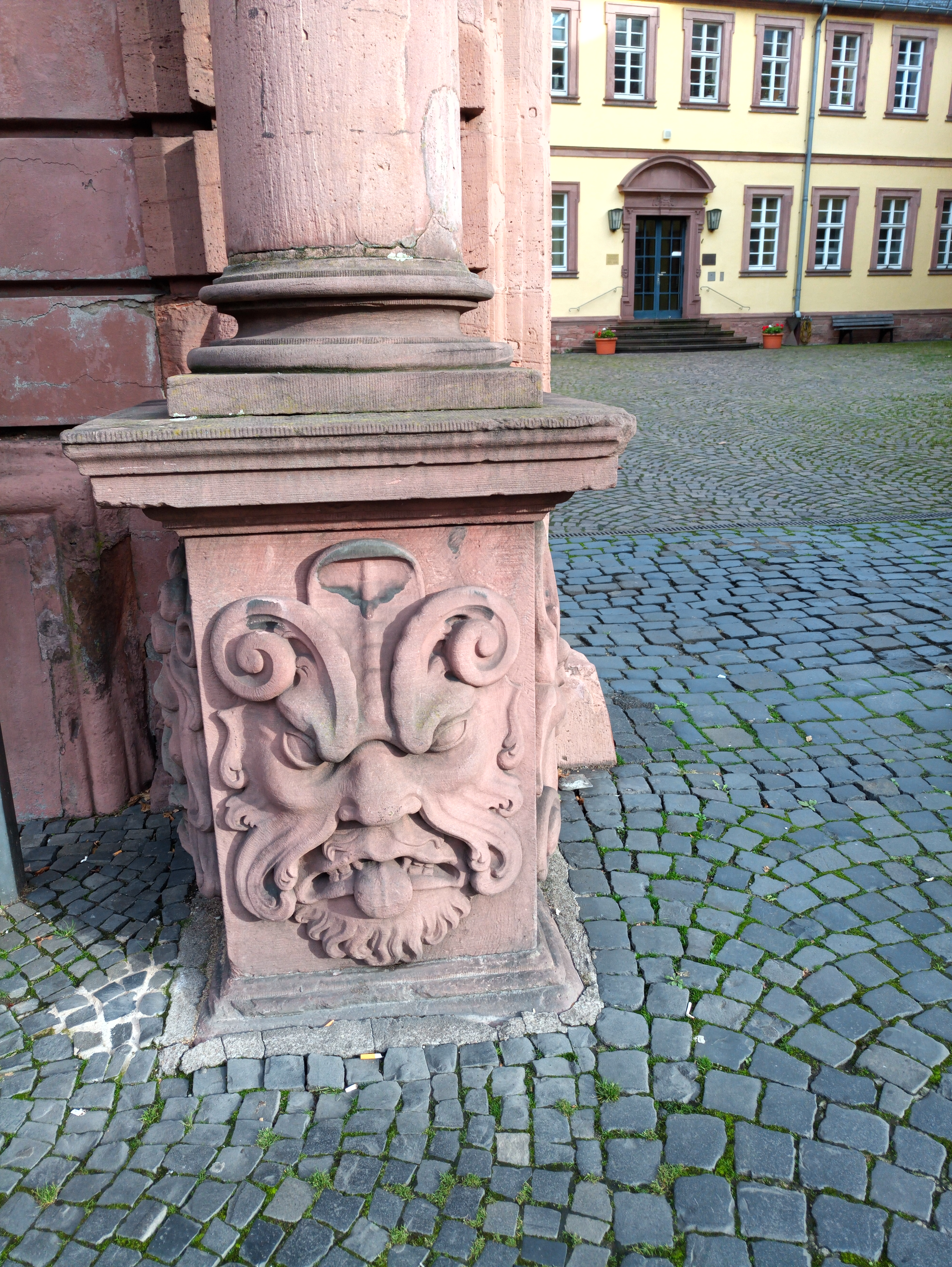 Im Hintergrund Eingang des Stadt- und Stiftsarchivs Aschaffenburg